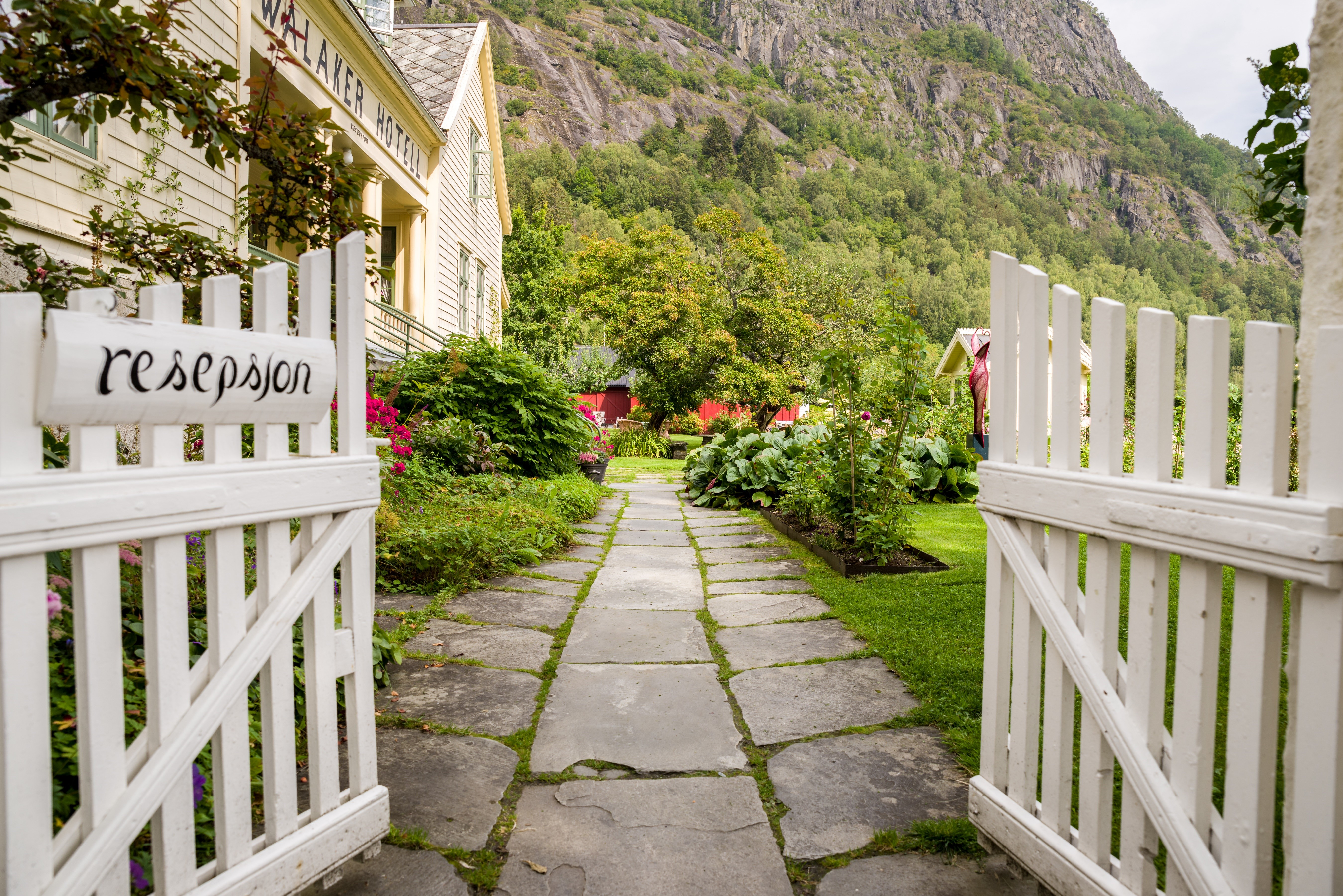 Walaker Hotell